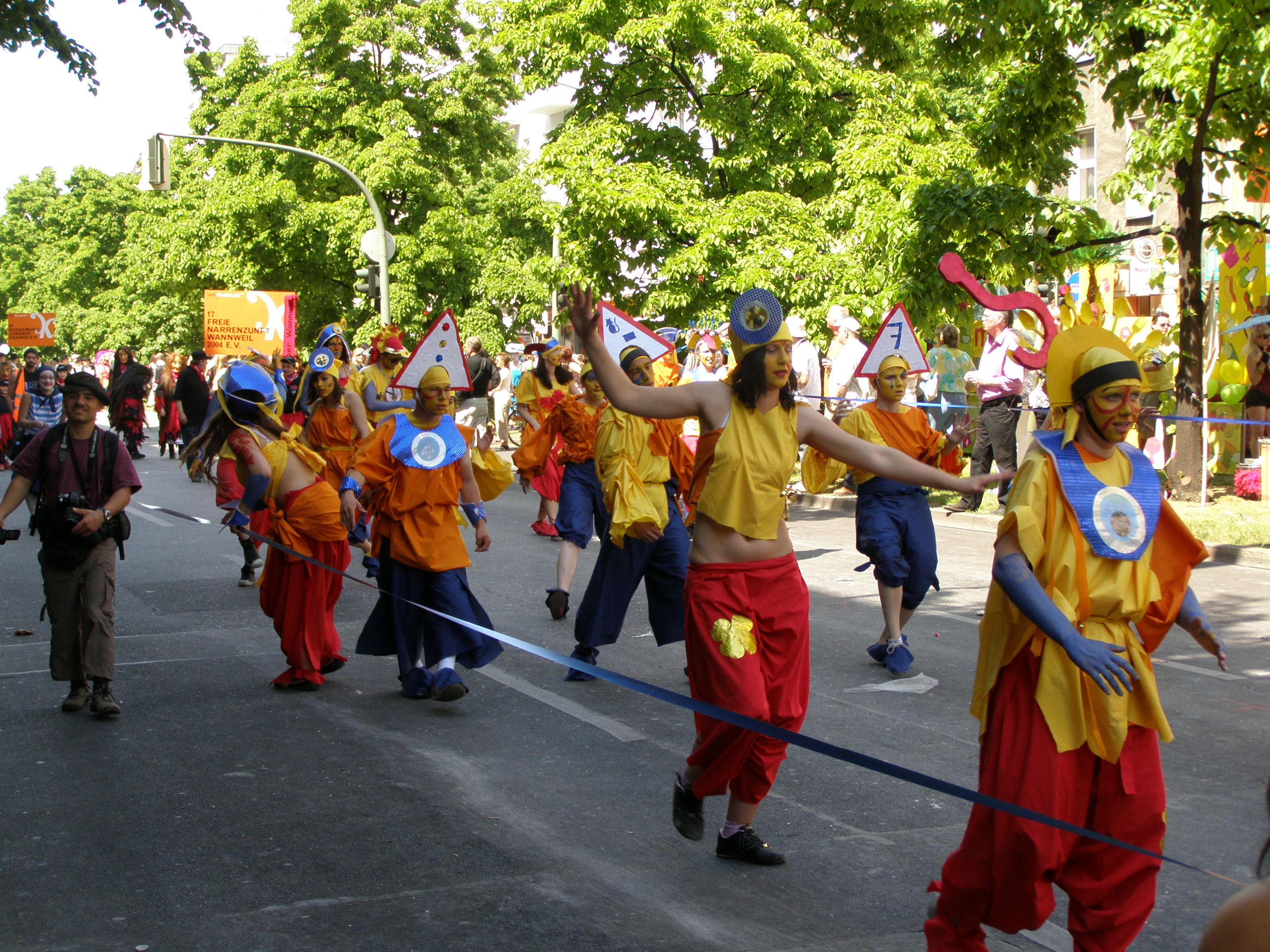 Karneval der Kulturen/Carnival of cultures in Berlin 2008, group: Das Narrenschiff